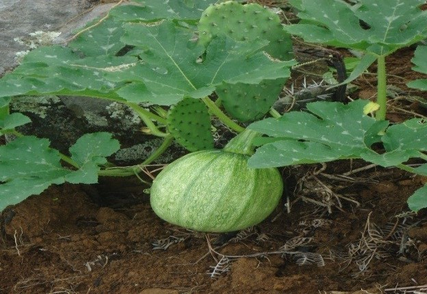 Cultivo en la comunidad de la Ciénega2